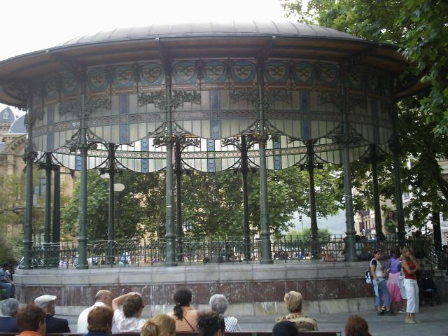 Kiosko en el Boulevard de Donostia, País Vasco, España